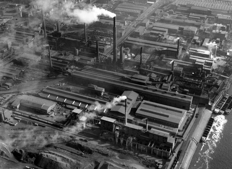 Krupp-Werke, Essen